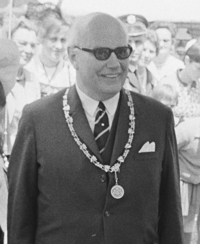 Prinses Margriet bij een kraam van een houtbewerker. Rechts van haar burgemeester van de gemeente Rheden J.P. Drost